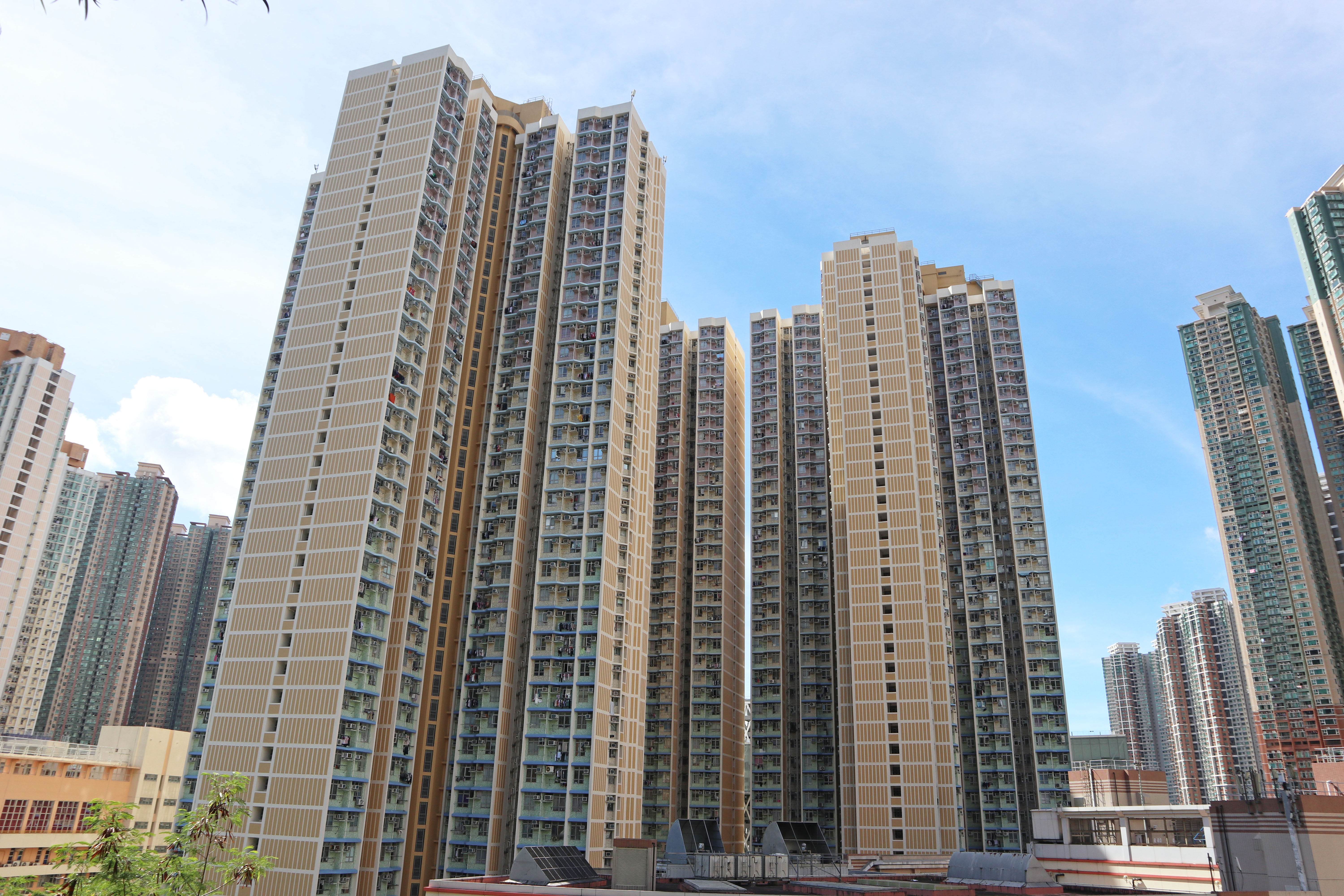 調景嶺彩明苑公屋大廈